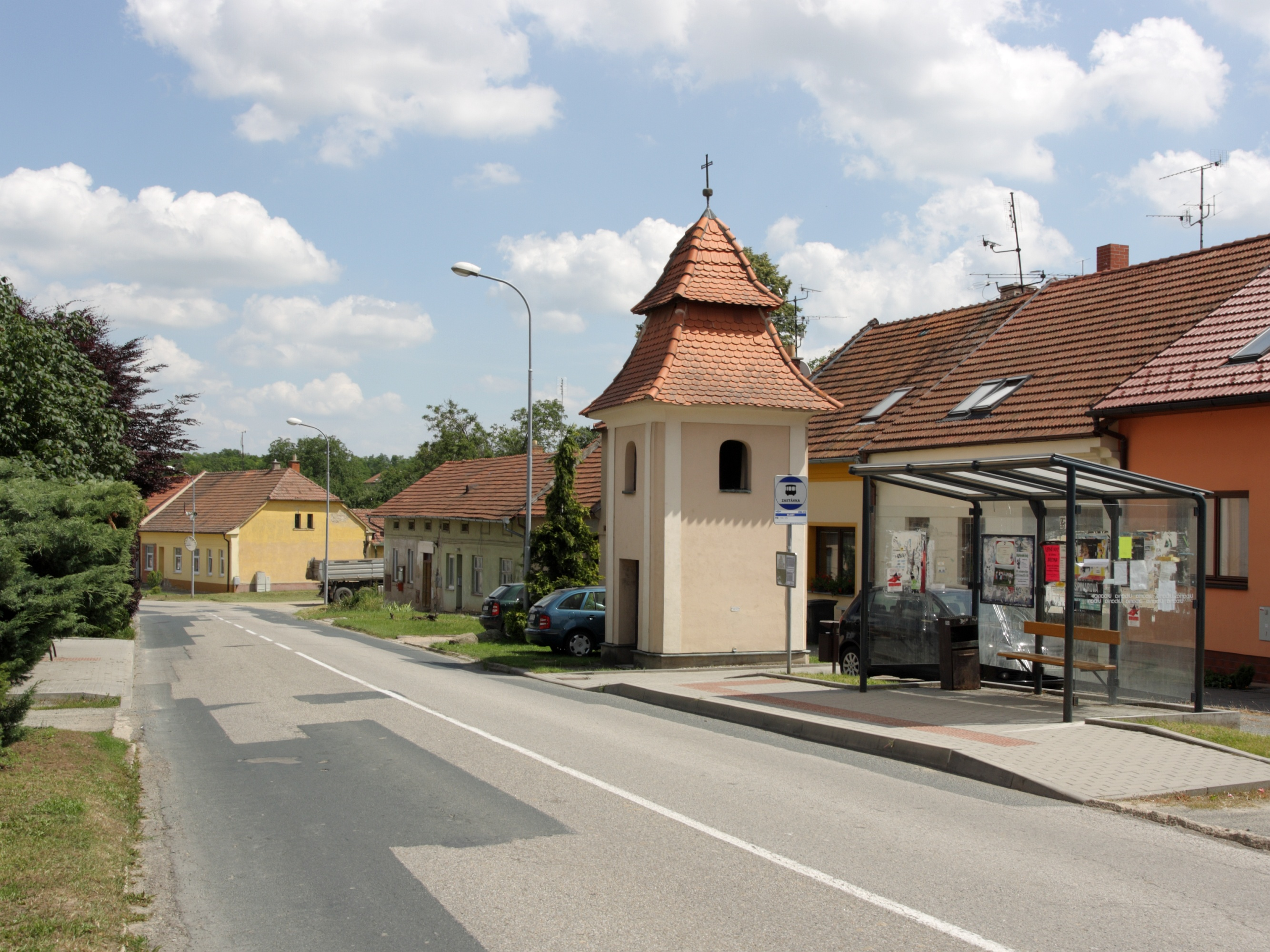 Hajany - hlavní ulice a kaple.